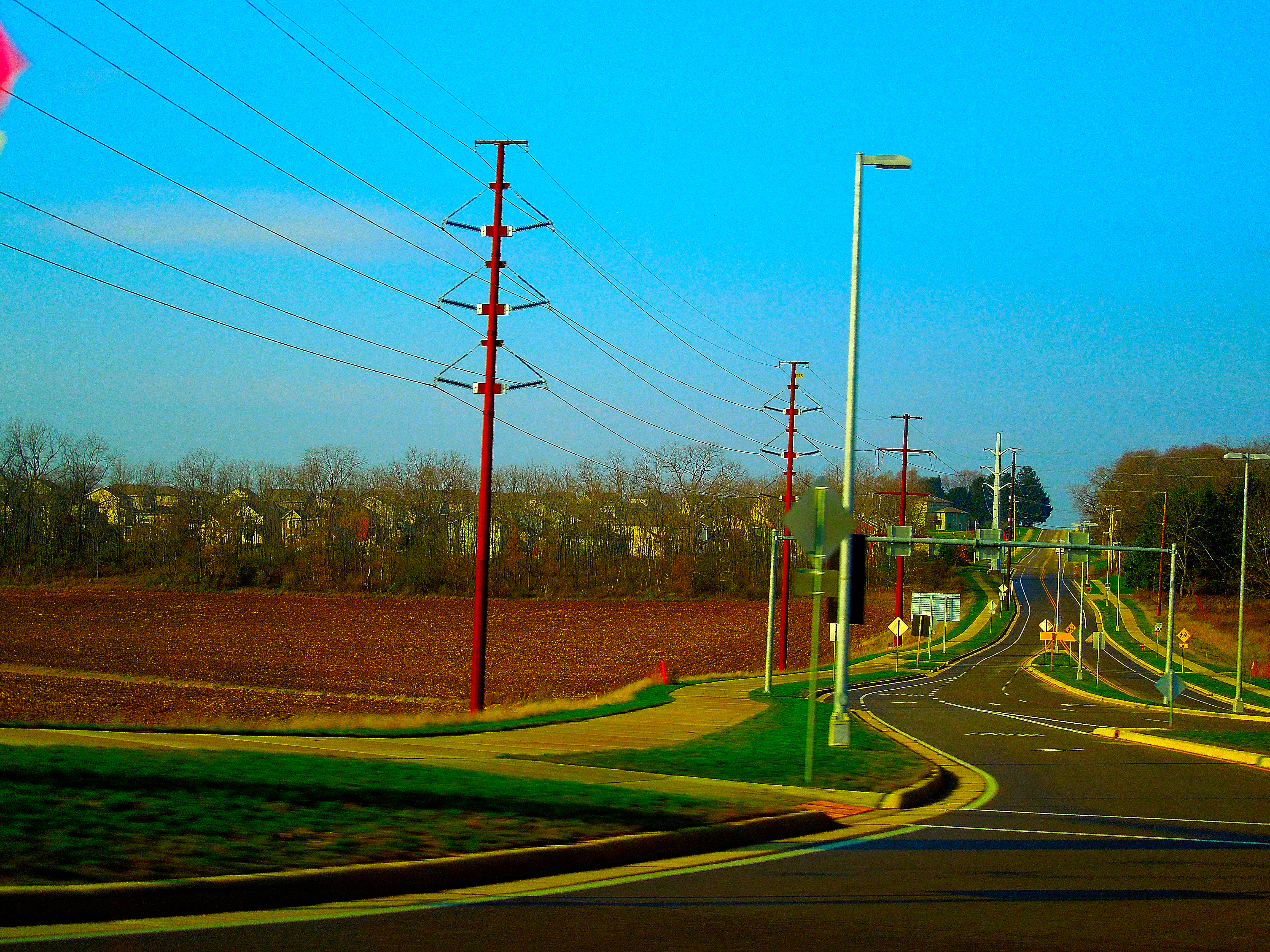 ATC Power Line